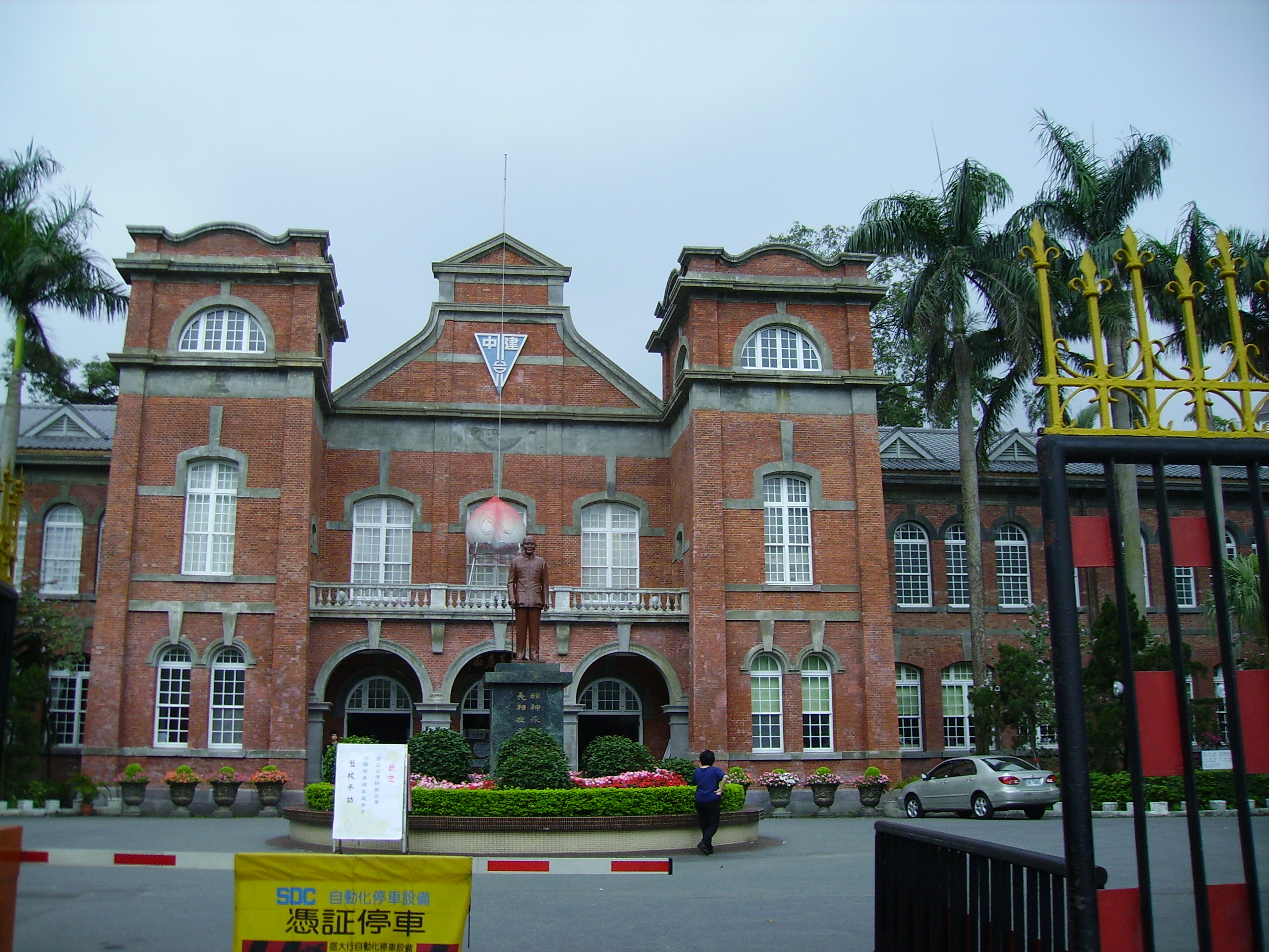 臺北市立建國高級中學。